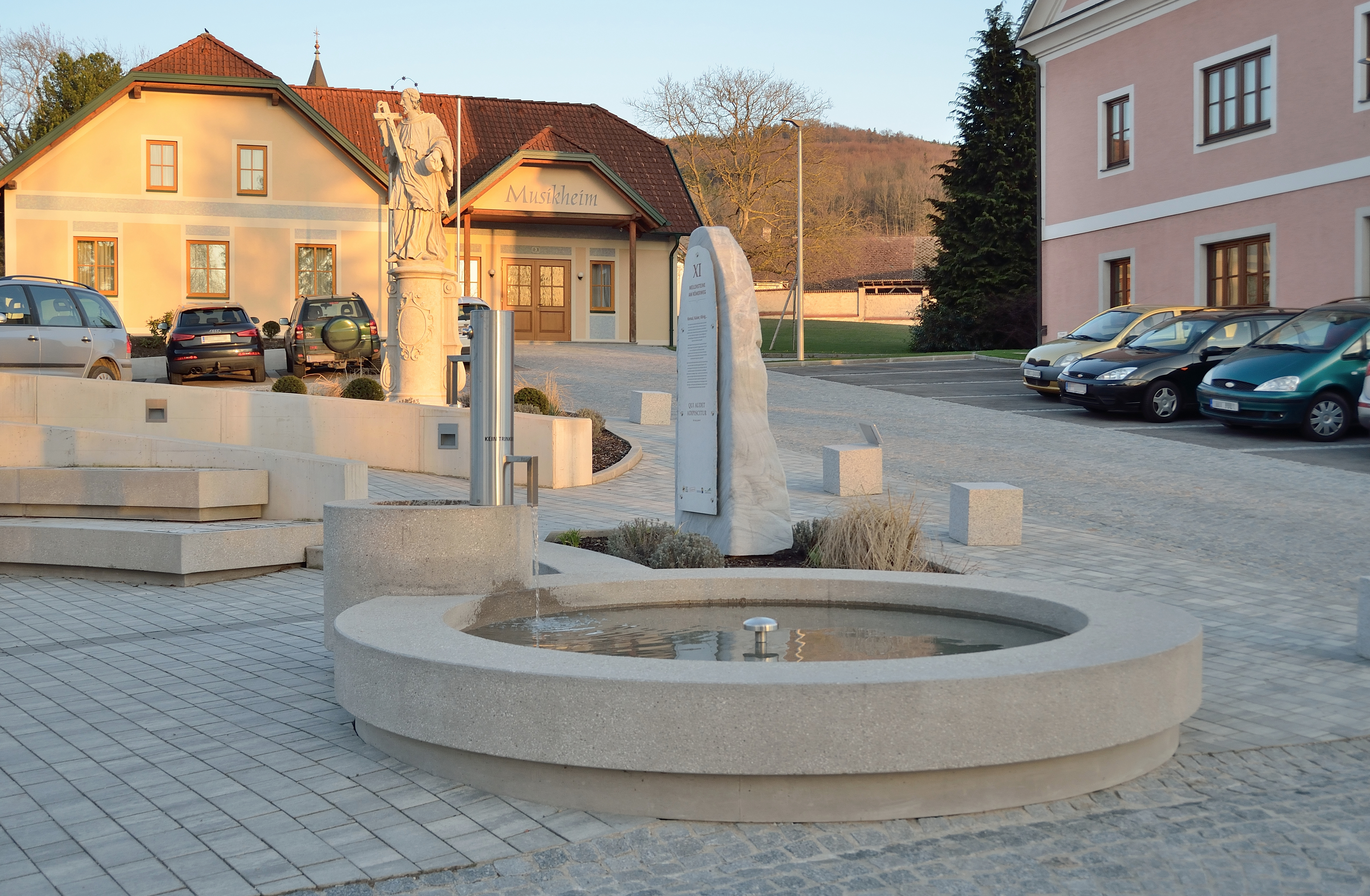 Platzgestaltung des Hauptplatzes (eigentlich Hauptstraße 1-3) in Kirnberg an der Mank: Brunnen, Nepomukstatue, Musikschule (im Hintergrund).